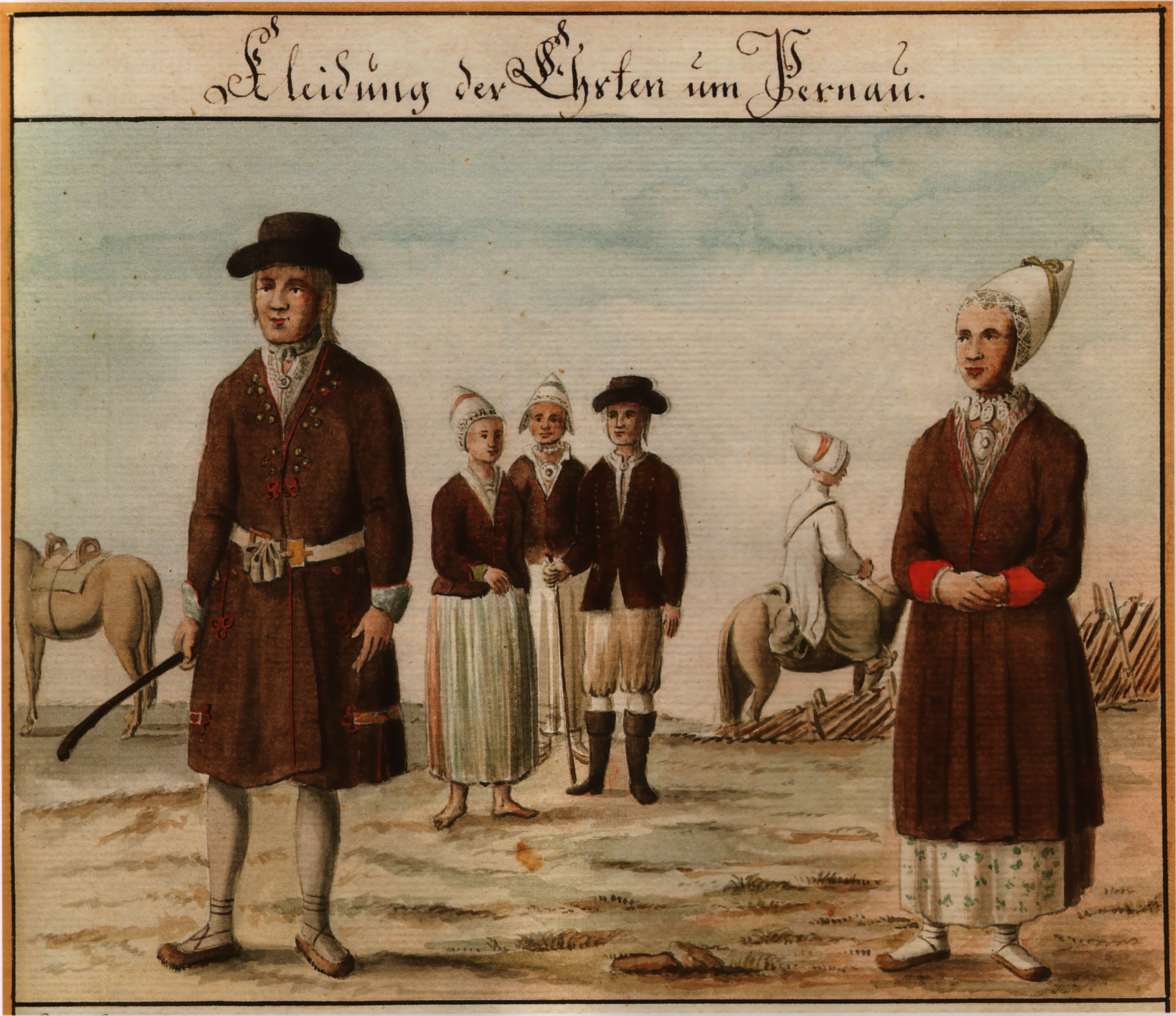 Eestlaste rõivastus Pärnu ümbruses